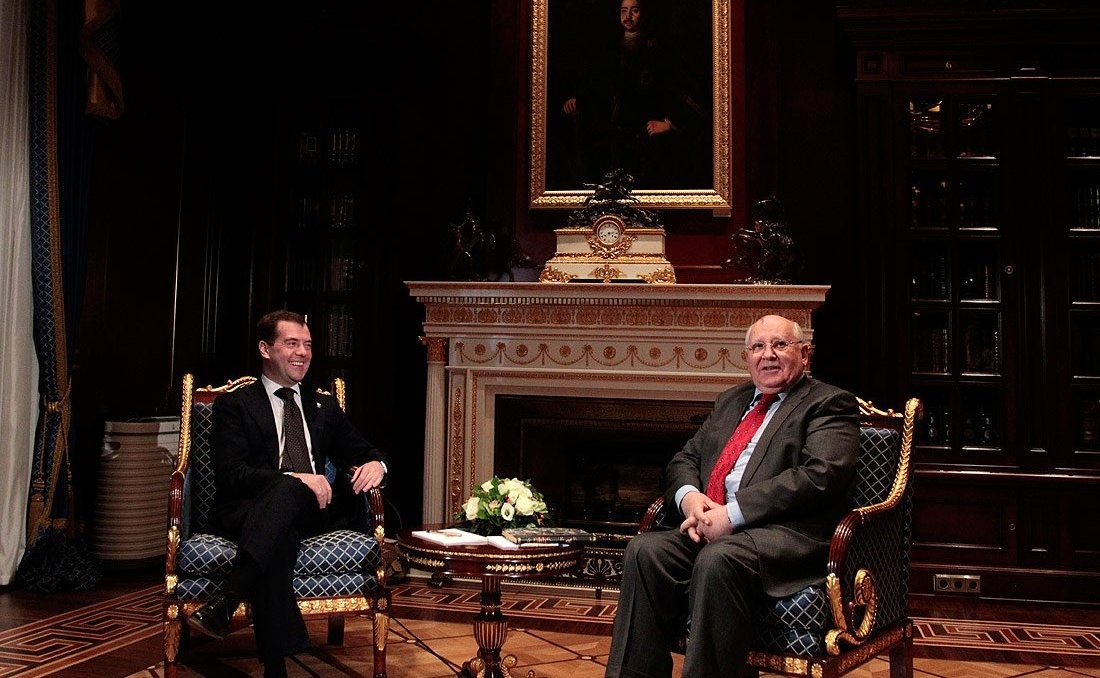 Встреча Президента России Дмитрия Медведева с Михаилом Горбачёвым. Дмитрий Медведев поздравил Михаила Горбачёва с 80-летием.